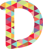 Logo von Dubsmash